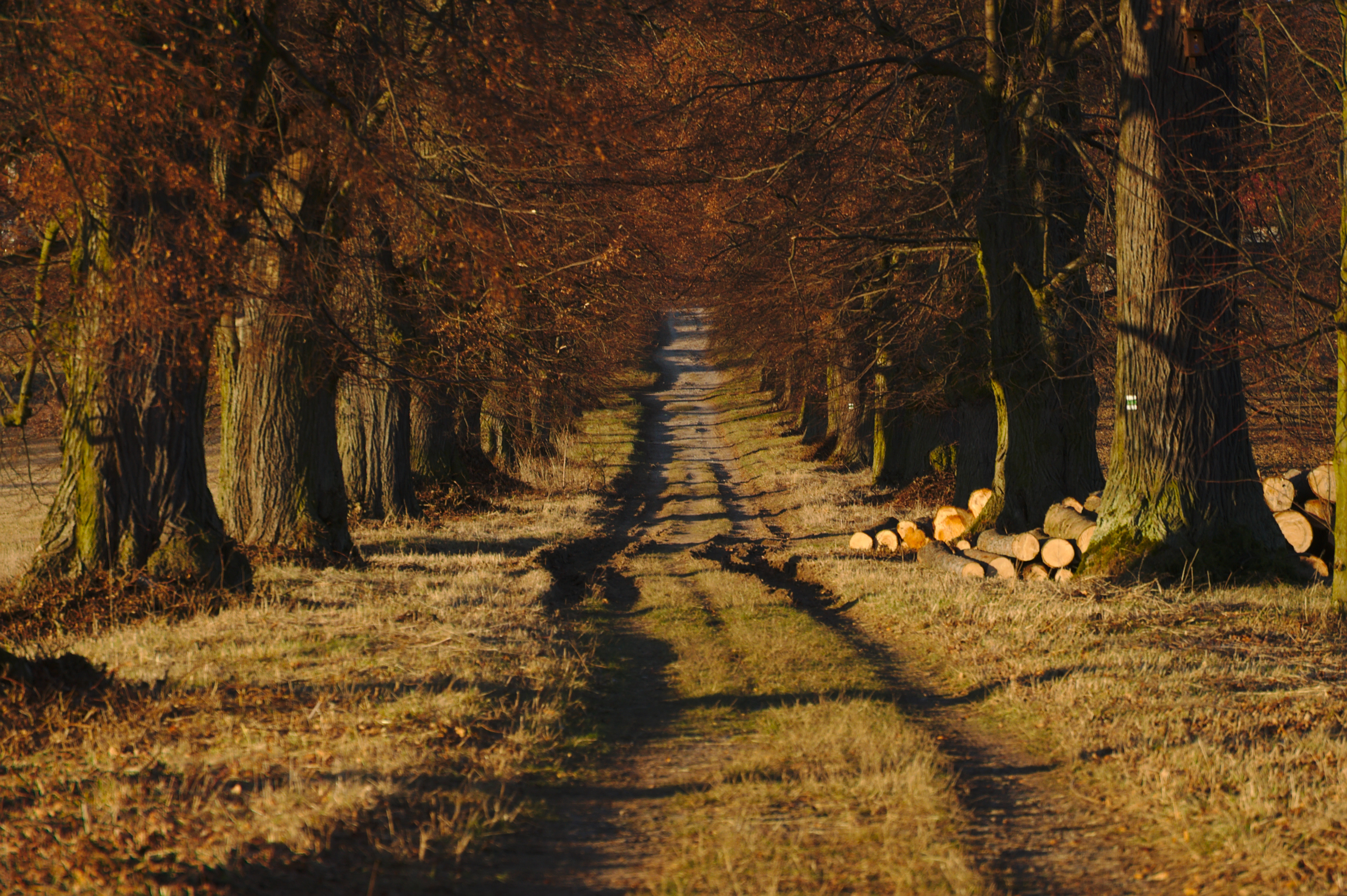 Alej vedoucí k Blanseku, Nové Dvory, Suchdol, Vavřinec, okres Blansko